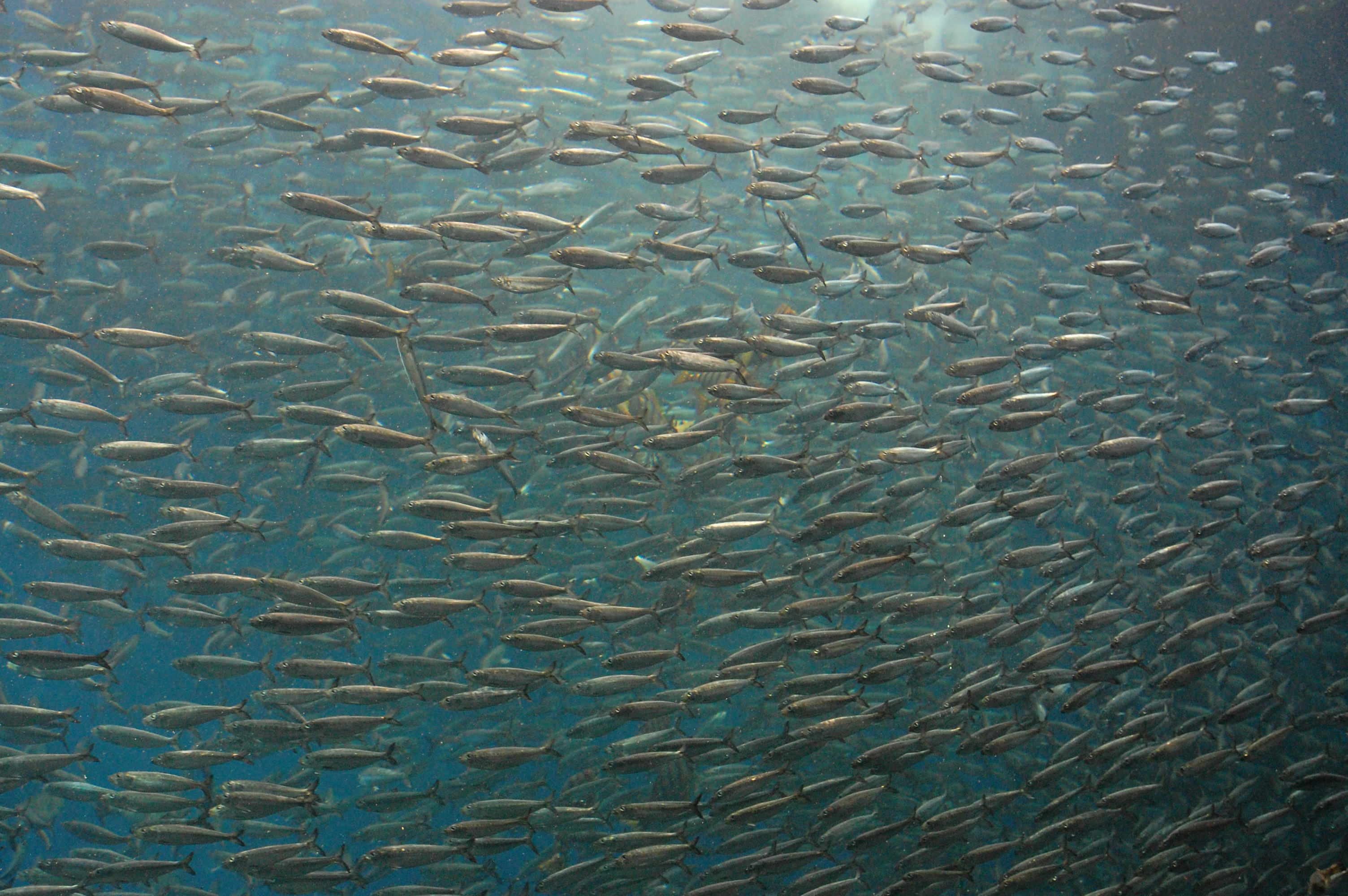 鰯の群れ（のとじま水族館）